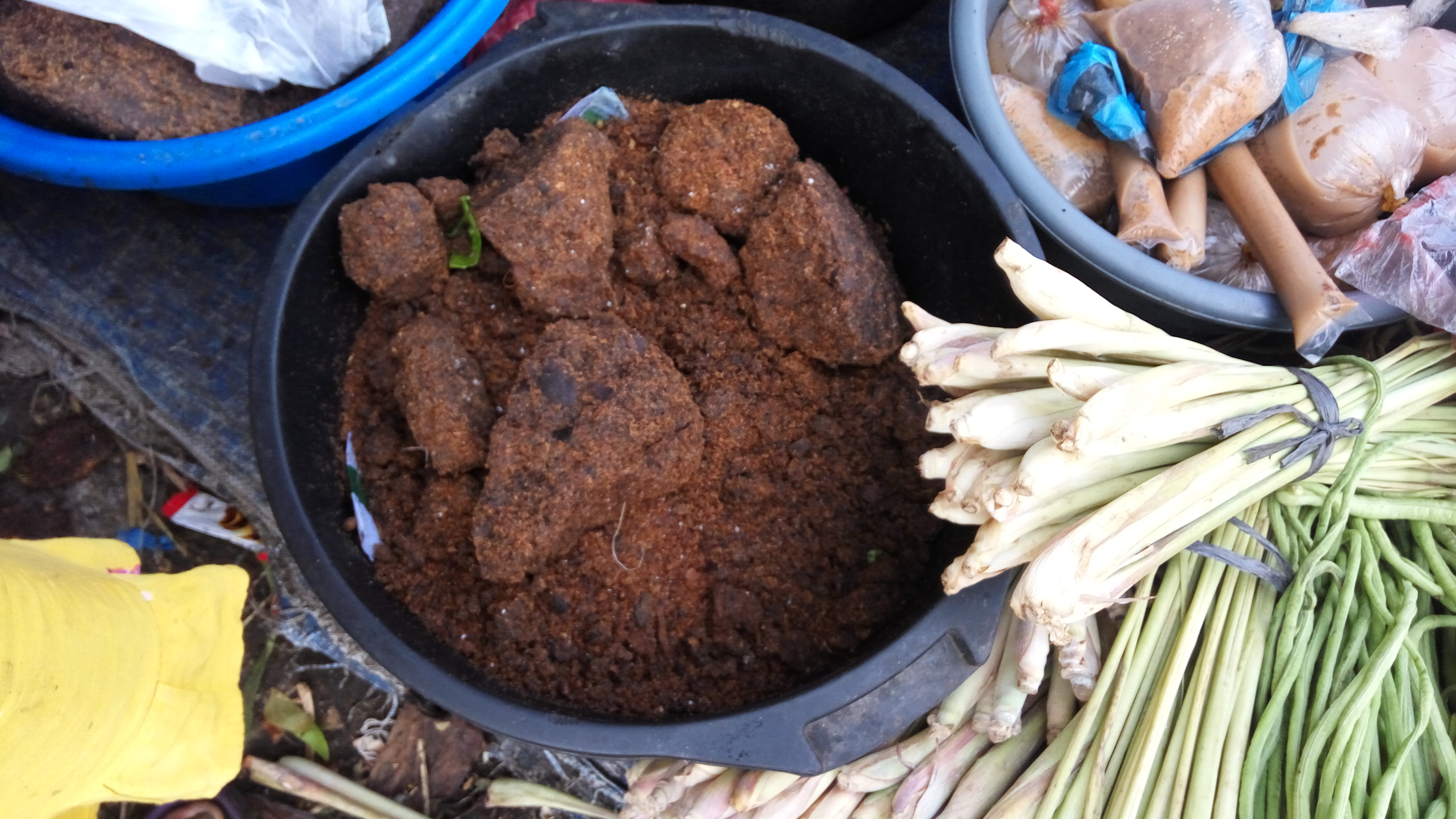 Pliek U, makanan tradisional Aceh